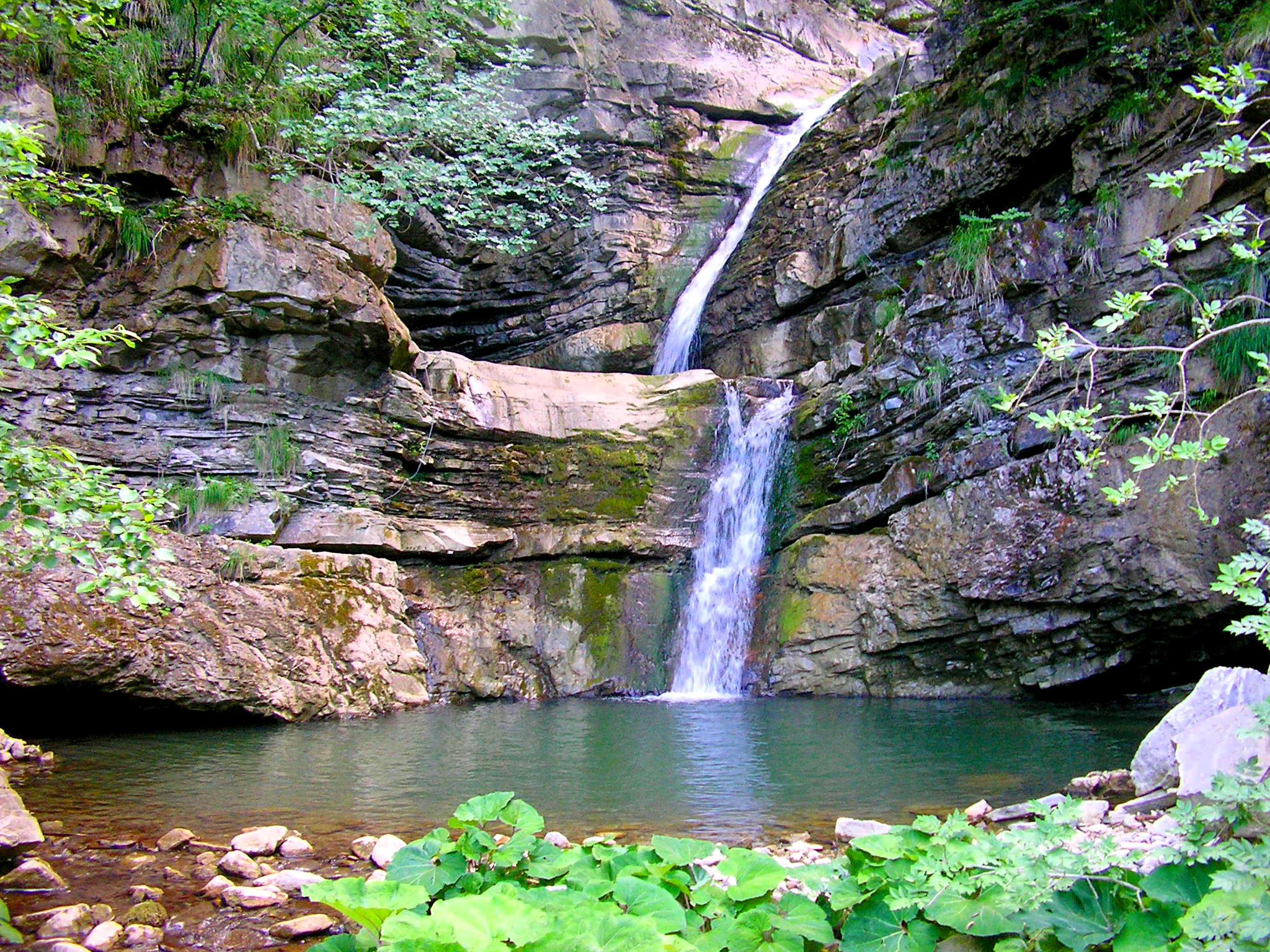 Cascata torrente Perino